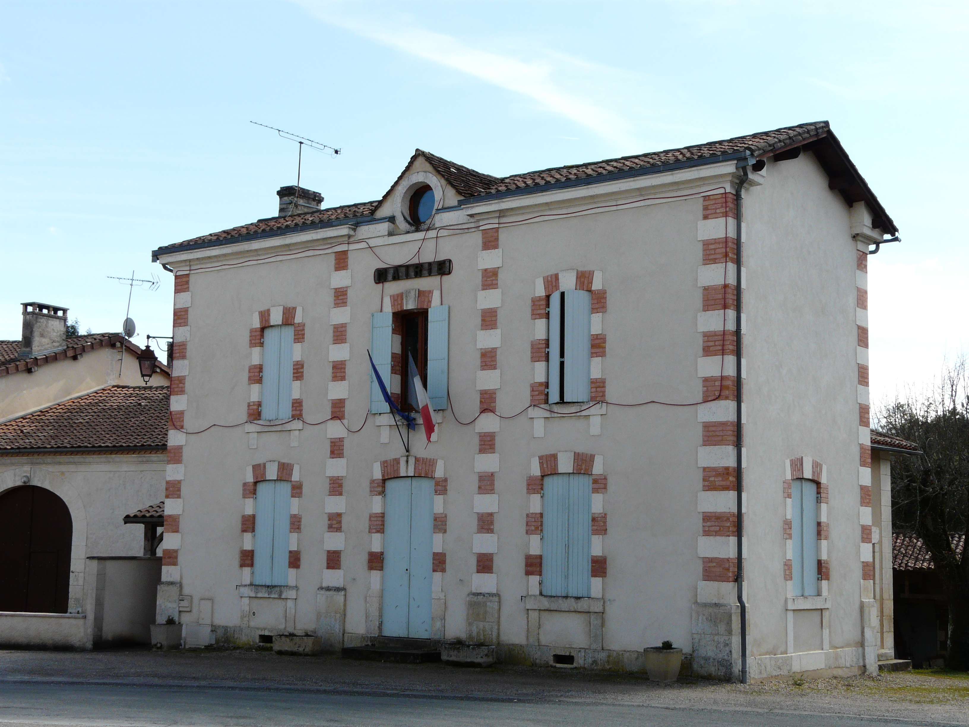 La mairie de Saint-Jean-d'Ataux, Dordogne, France.